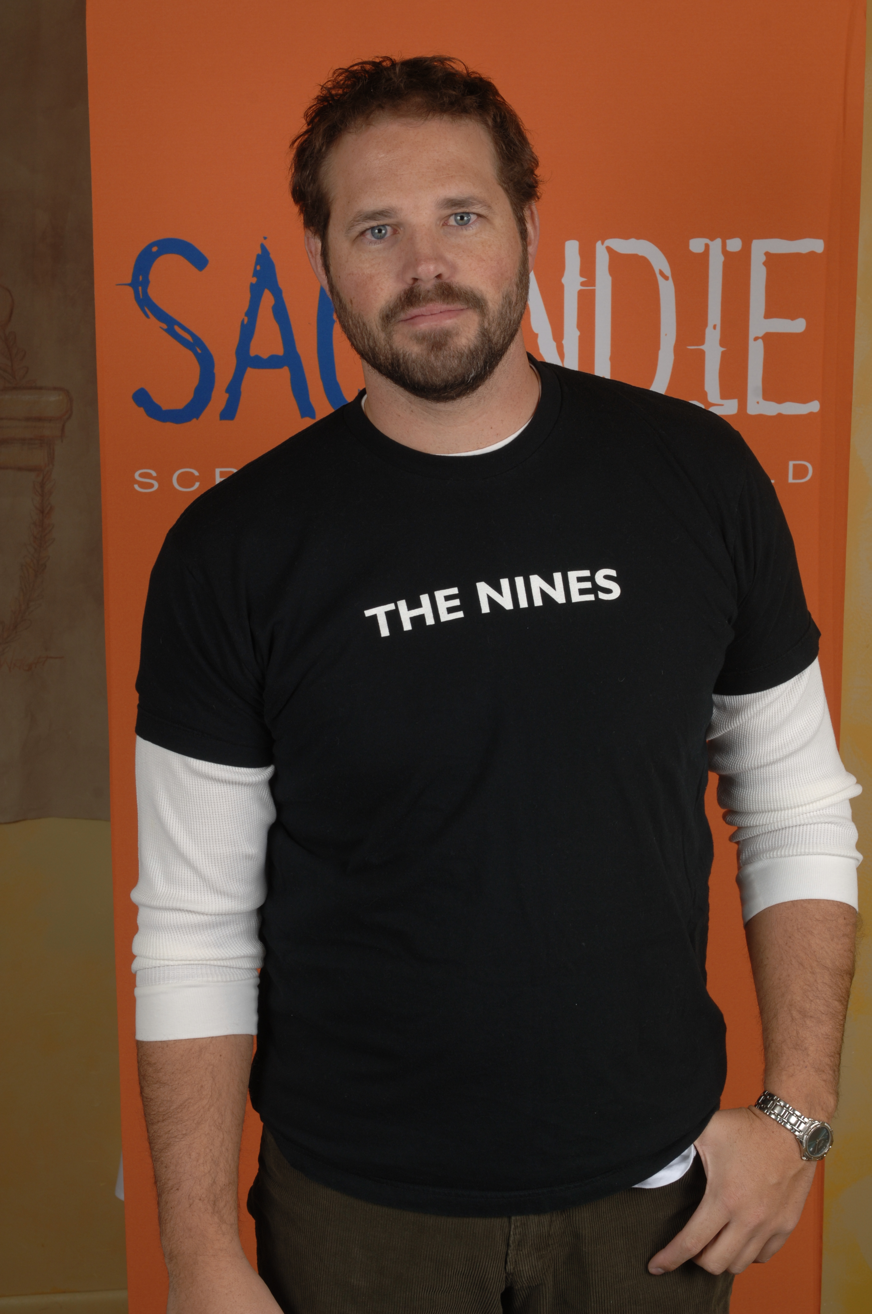 David Denman.